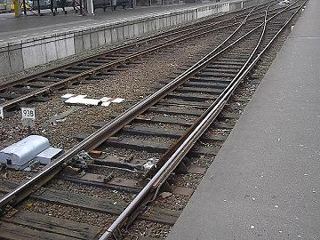 Wissel 93B te Zutphen